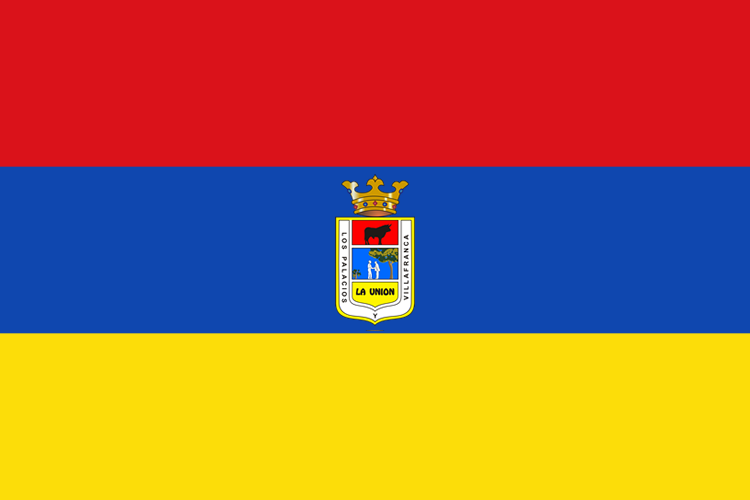 Bandera Oficial del Ayuntamiento de Los Palacios y Villafranca